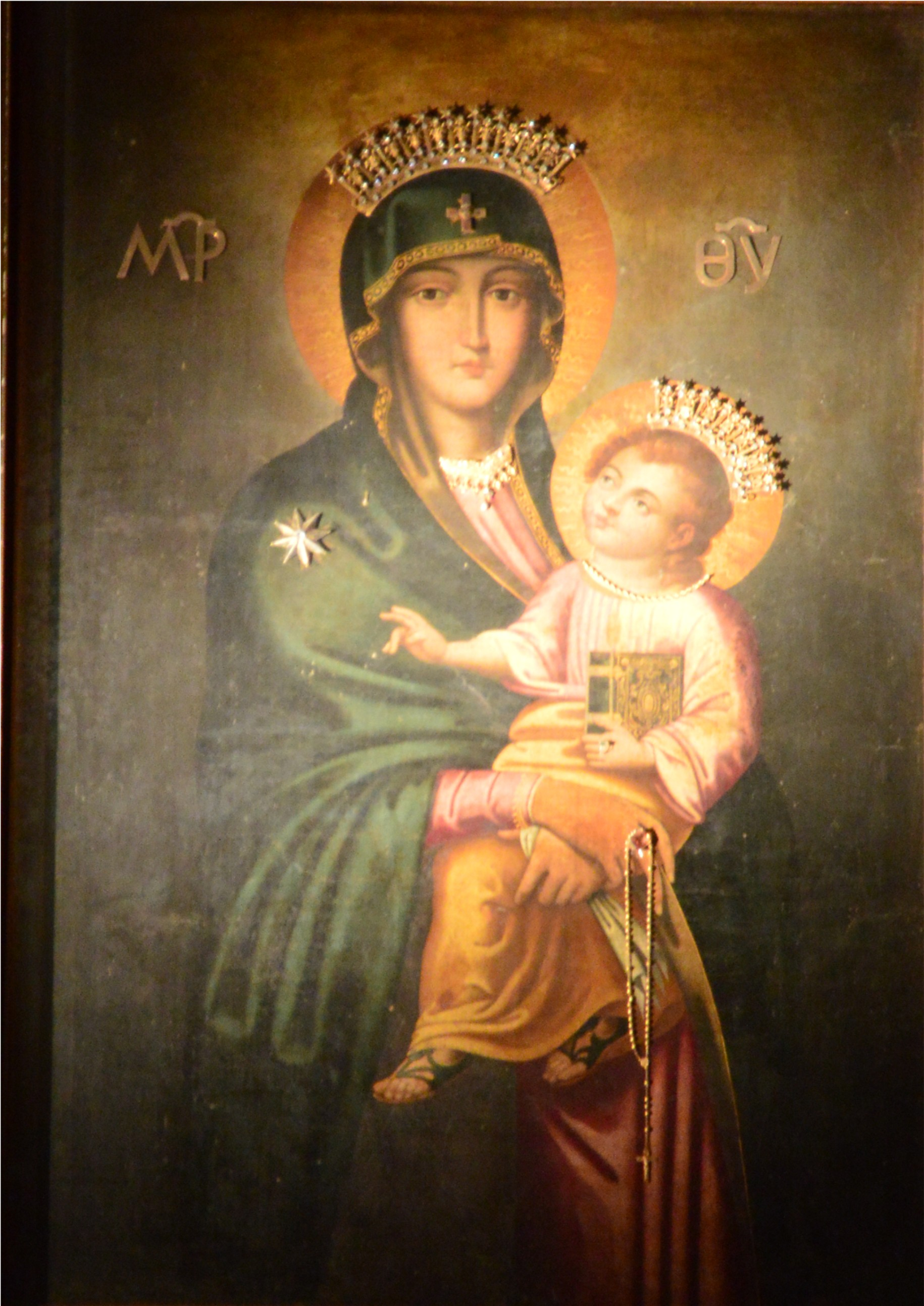 Icona della Madonna della Salute, ispirata alla Salus Populi Romani, che si venera nel santuario omonimo nella città di Taranto.